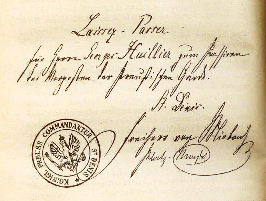 Laissez-passer délivré en 1871 par la Commandantur de Saint-Denis.